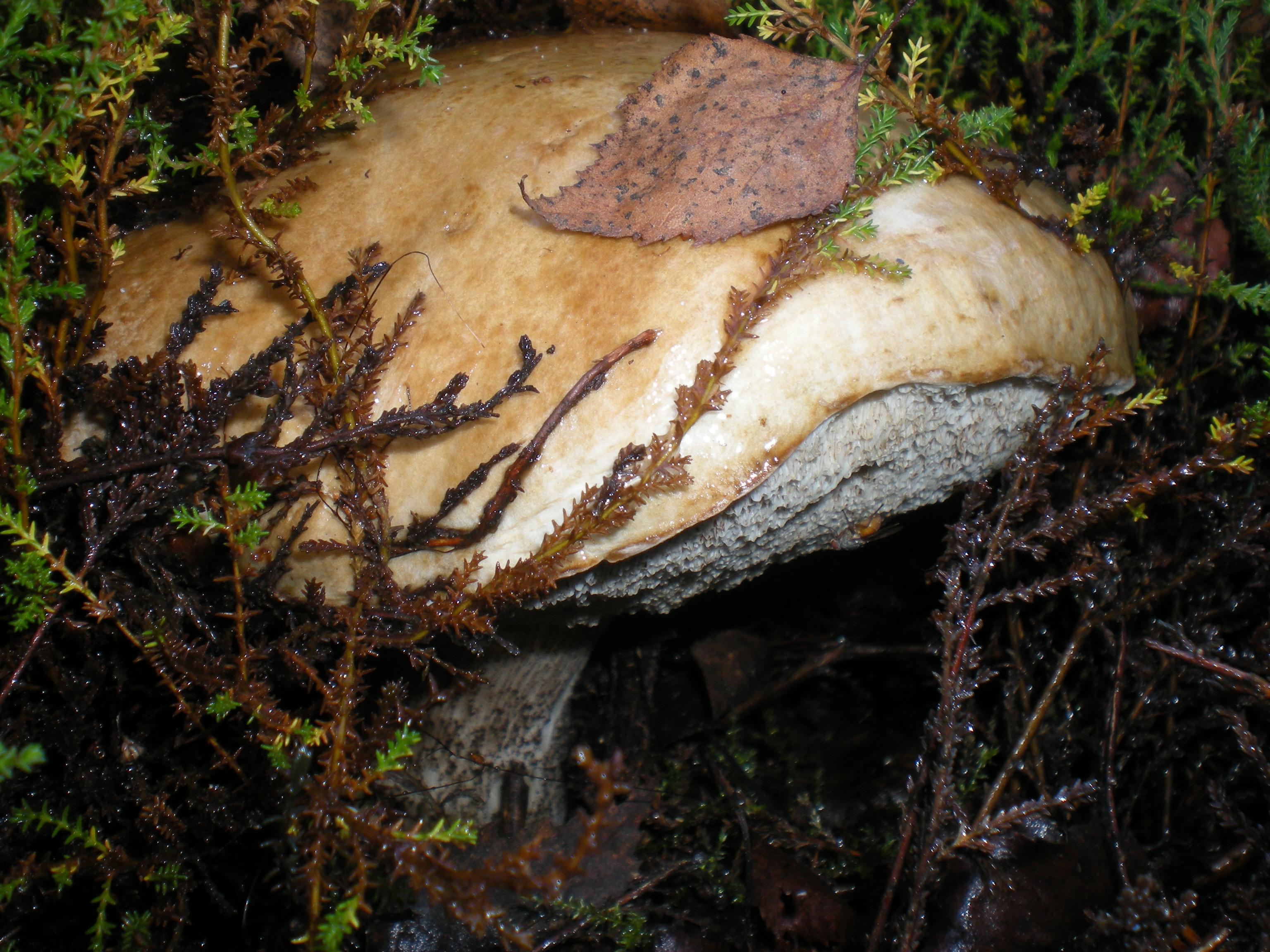 Koźlarz pomarańczowy, koźlarz pomarańczowożółty (Leccinum versipelle), Wólka Łękawska, Polska, 51°18'24"N, 19°23'34"E (51.3065, 19.3928)